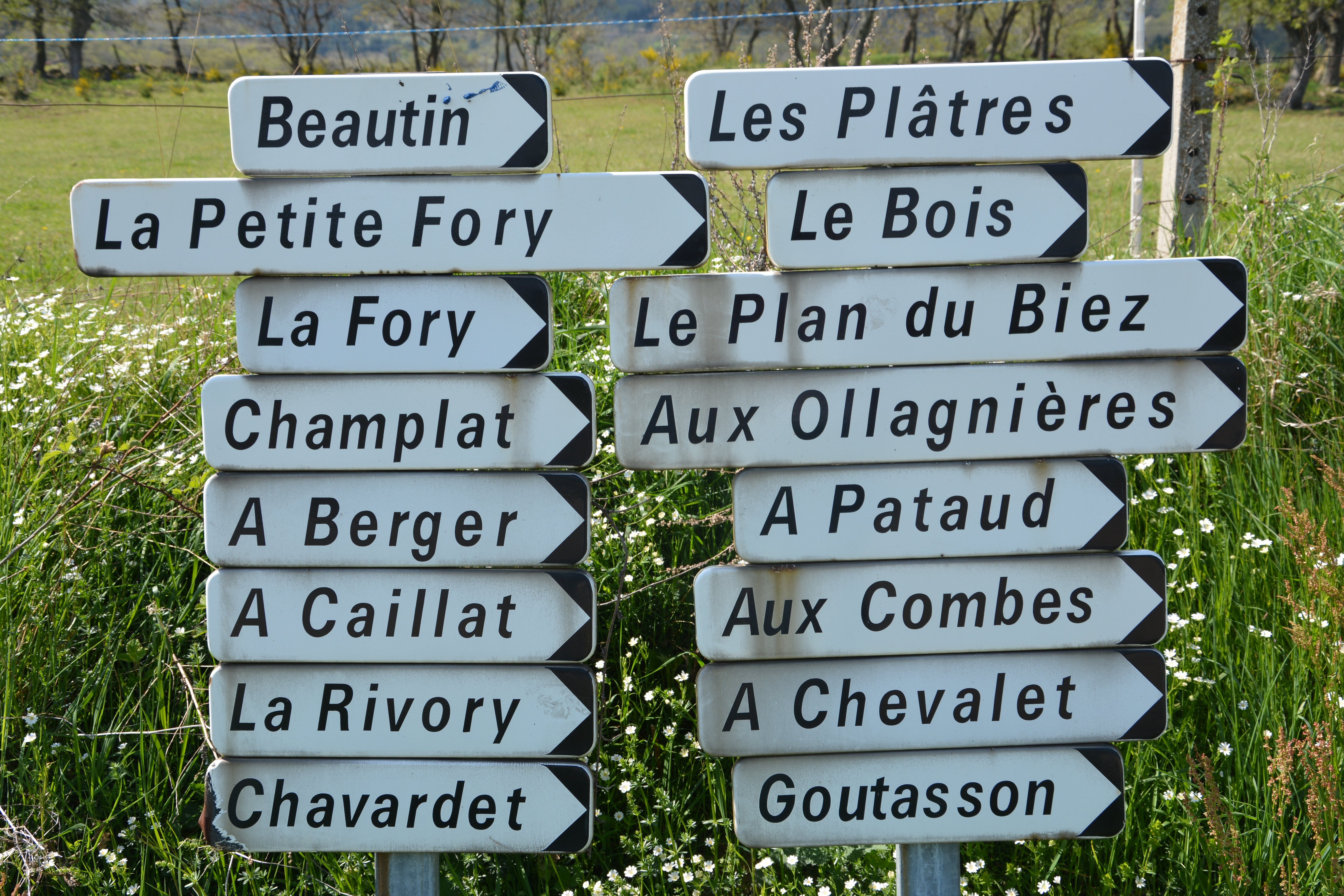 Hameaux du village de Roisey, avril 2015.